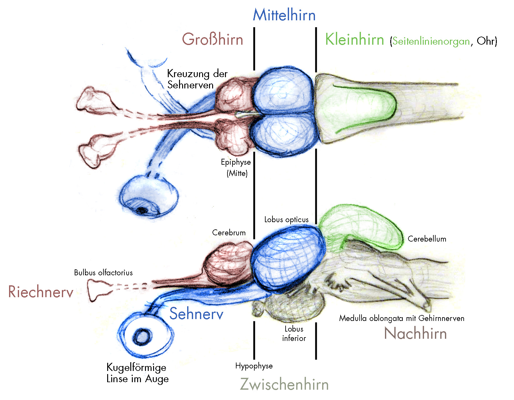 vereinfachte Synthese Dorschhirn (Gadus) nach Romer/Parsons vergleichende Anatomie der Wirbeltiere aus dem Pary Verlag selbstgezeichnet und nicht konsitent beschriftet.